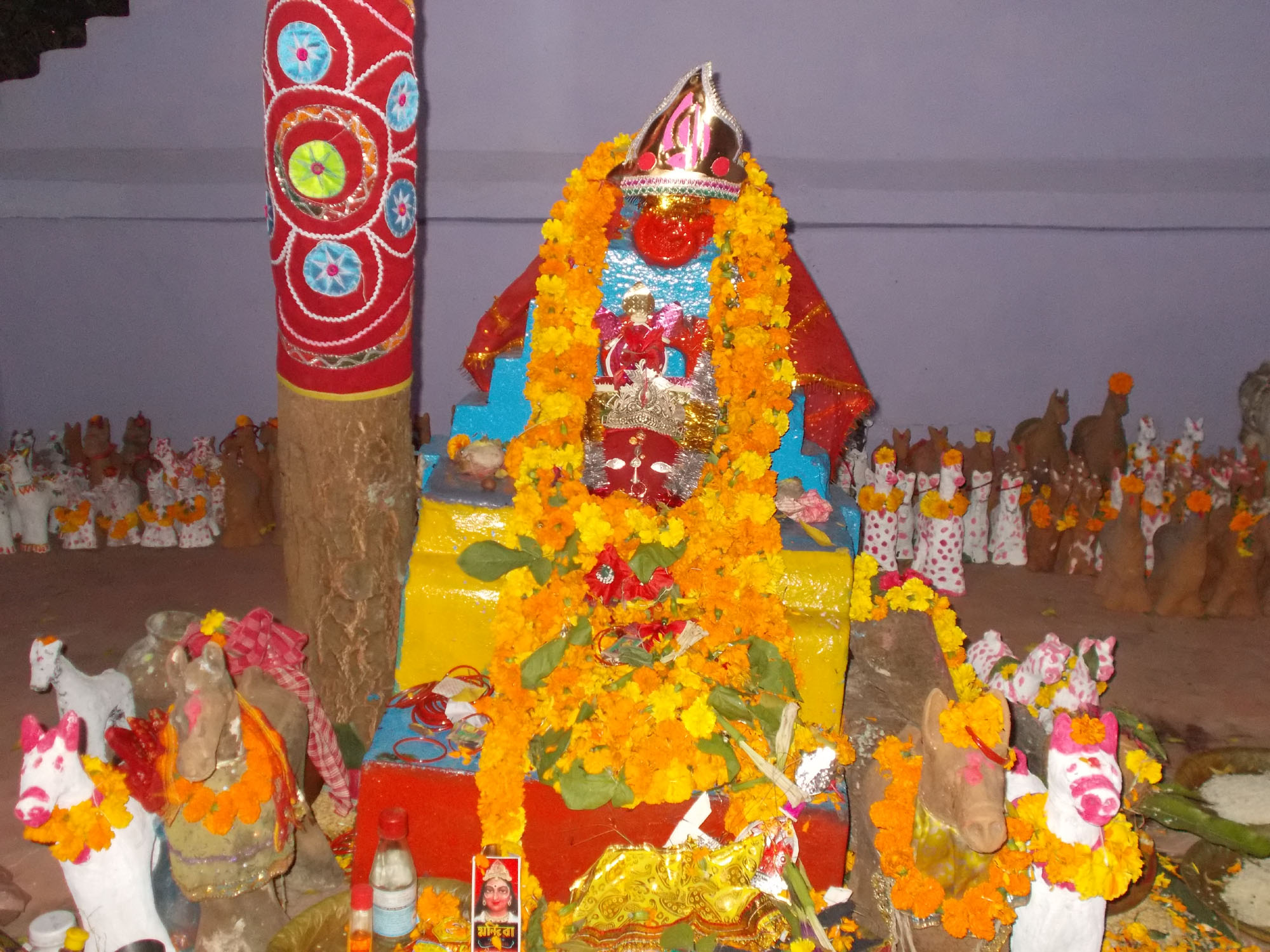 ଓଡ଼ିଆ: ନିଳୋକର ଆରାଧ୍ୟ ଦେବୀ ମାଆ ବାଉଳାଶୁଣୀ ।